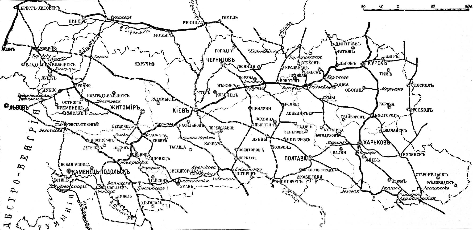 Карта Киевского военного округа Российской империи. Это изображение было использовано для иллюстрирования статьи «Киевский военный округ» опубликованной в двенадцатом томе «Военной энциклопедии», который был издан книгоиздательским товариществом И. Д. Сытина в 1913 году в столице Российской империи городе Санкт-Петербурге. Более подробное описание к этой картинке можно прочесть в указанной выше статье.